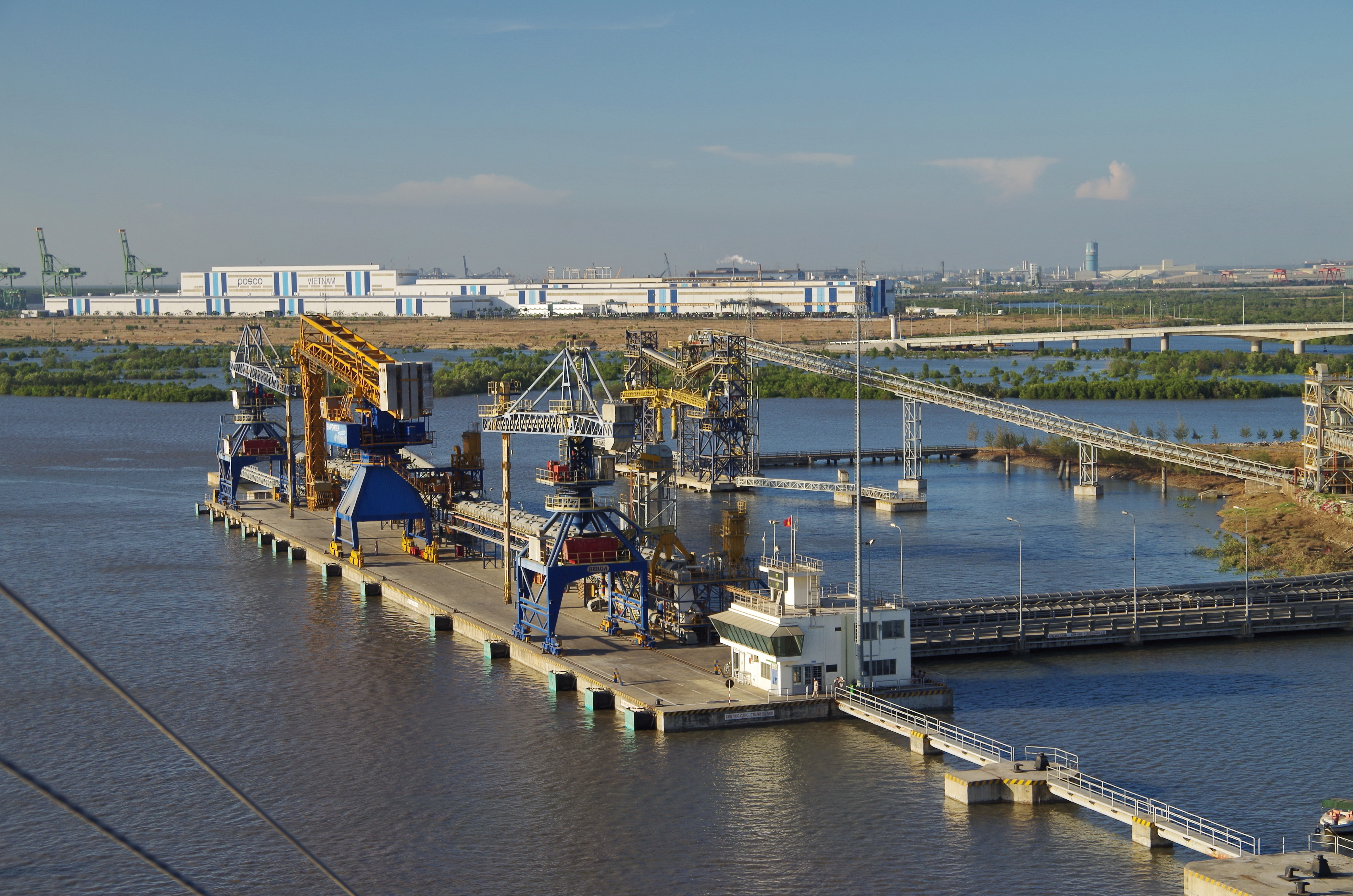 Hafen von Phu My